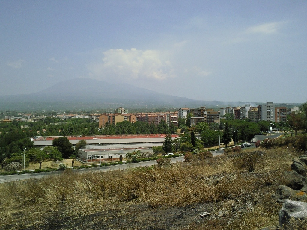 Panorama del quartiere "Ardizzone" di Paternò (CT)